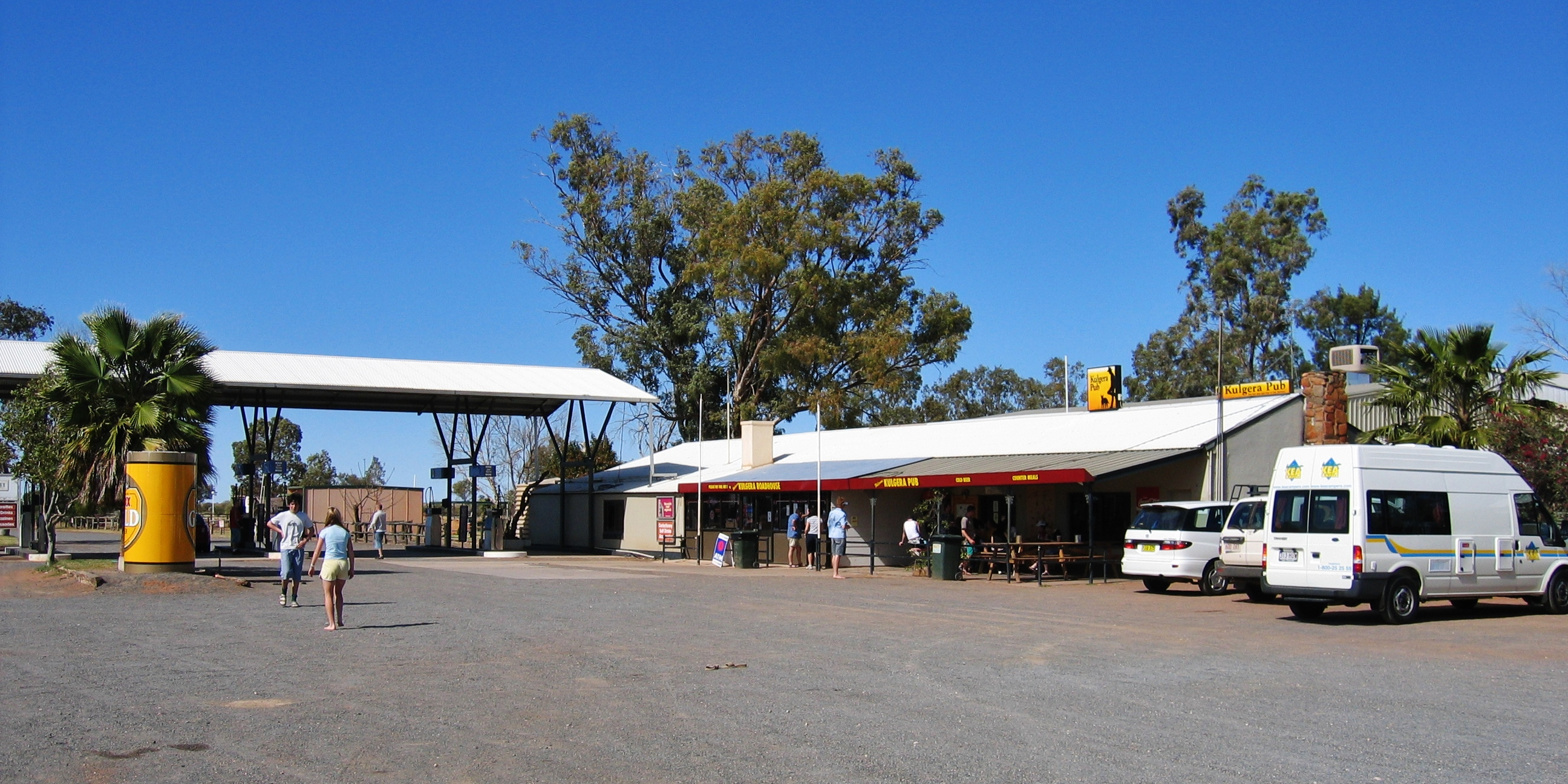 Kulgera Pub